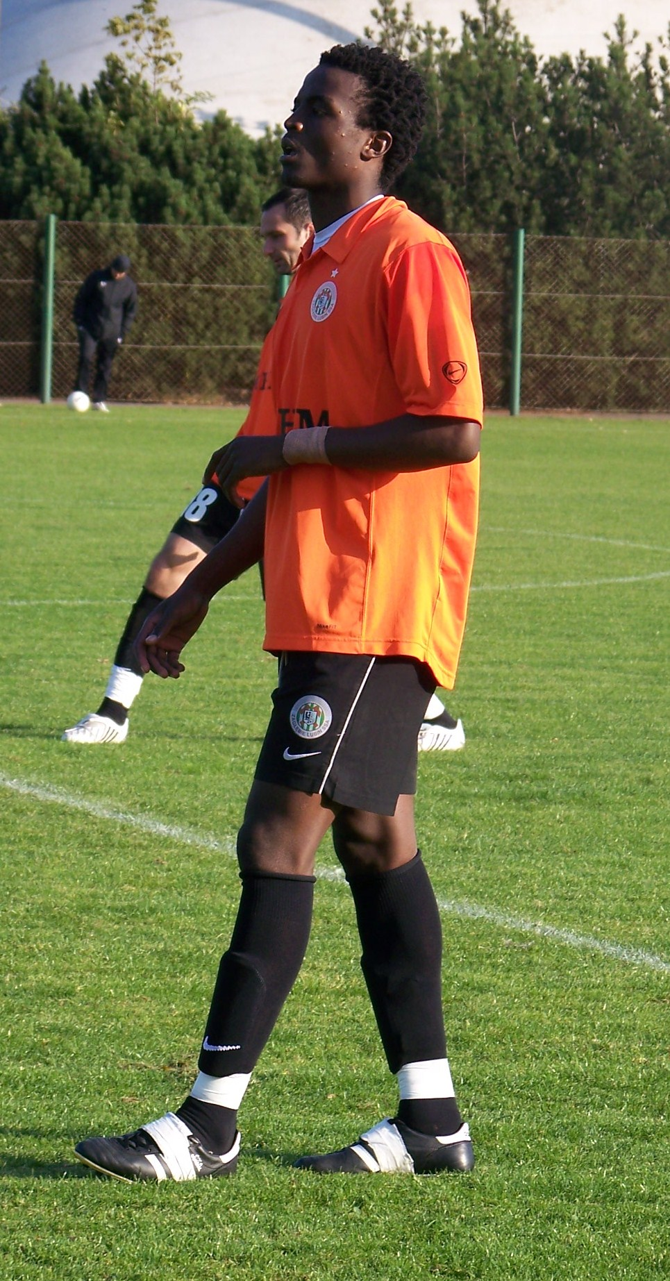 Costa Nhamoinesu podczas meczu I ligi z Wartą Poznań.